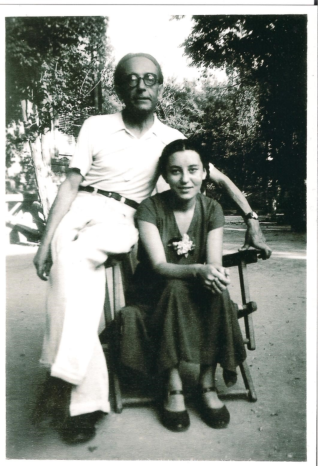 Antonio Paños con su hija Natacha